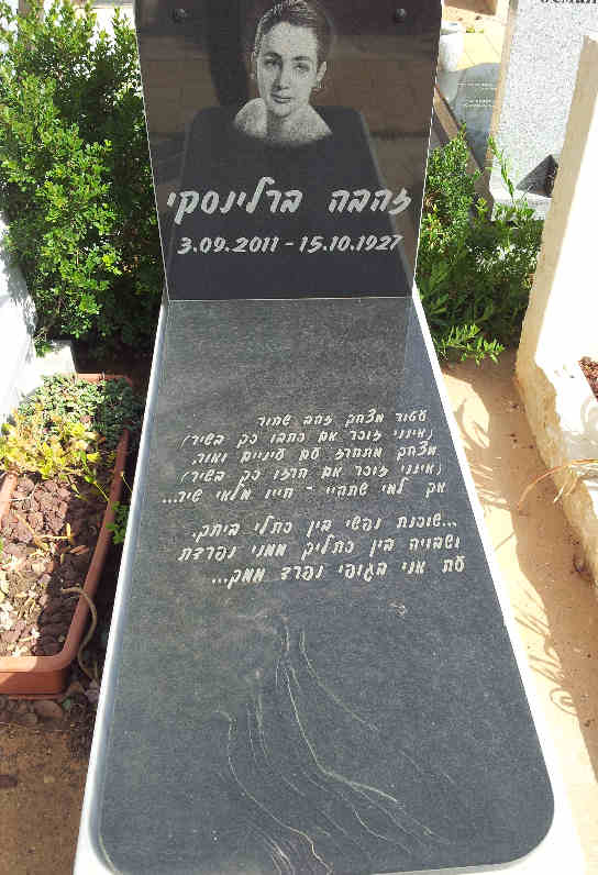 עטור מצחך - על המצבה של זהבה ברלינסקי